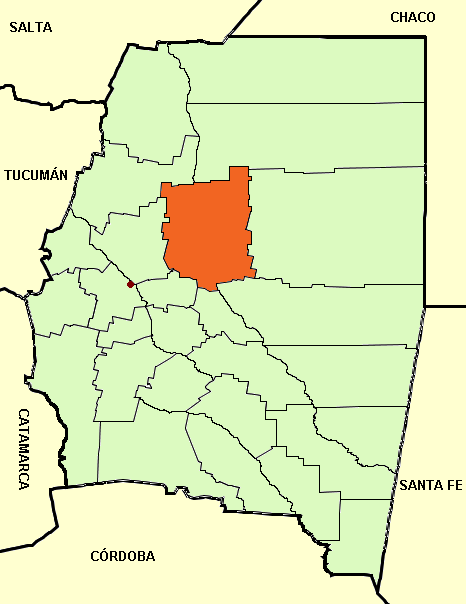 Mapa editado de: Santiago del Estero province (Argentina), departments and capital.png